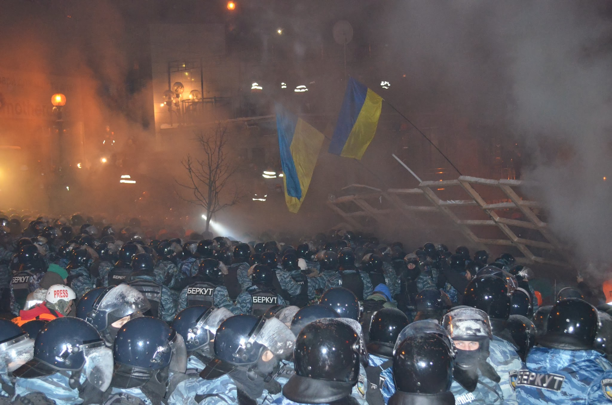 Штурм Майдана